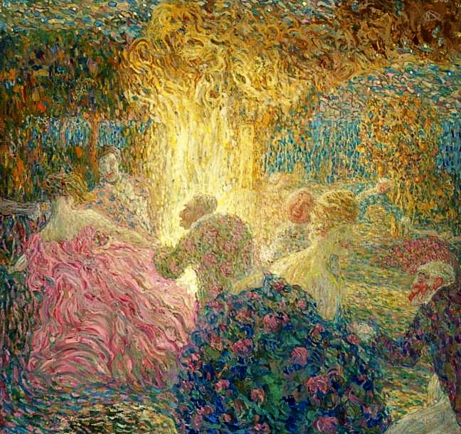 Картина Василия Милиоти